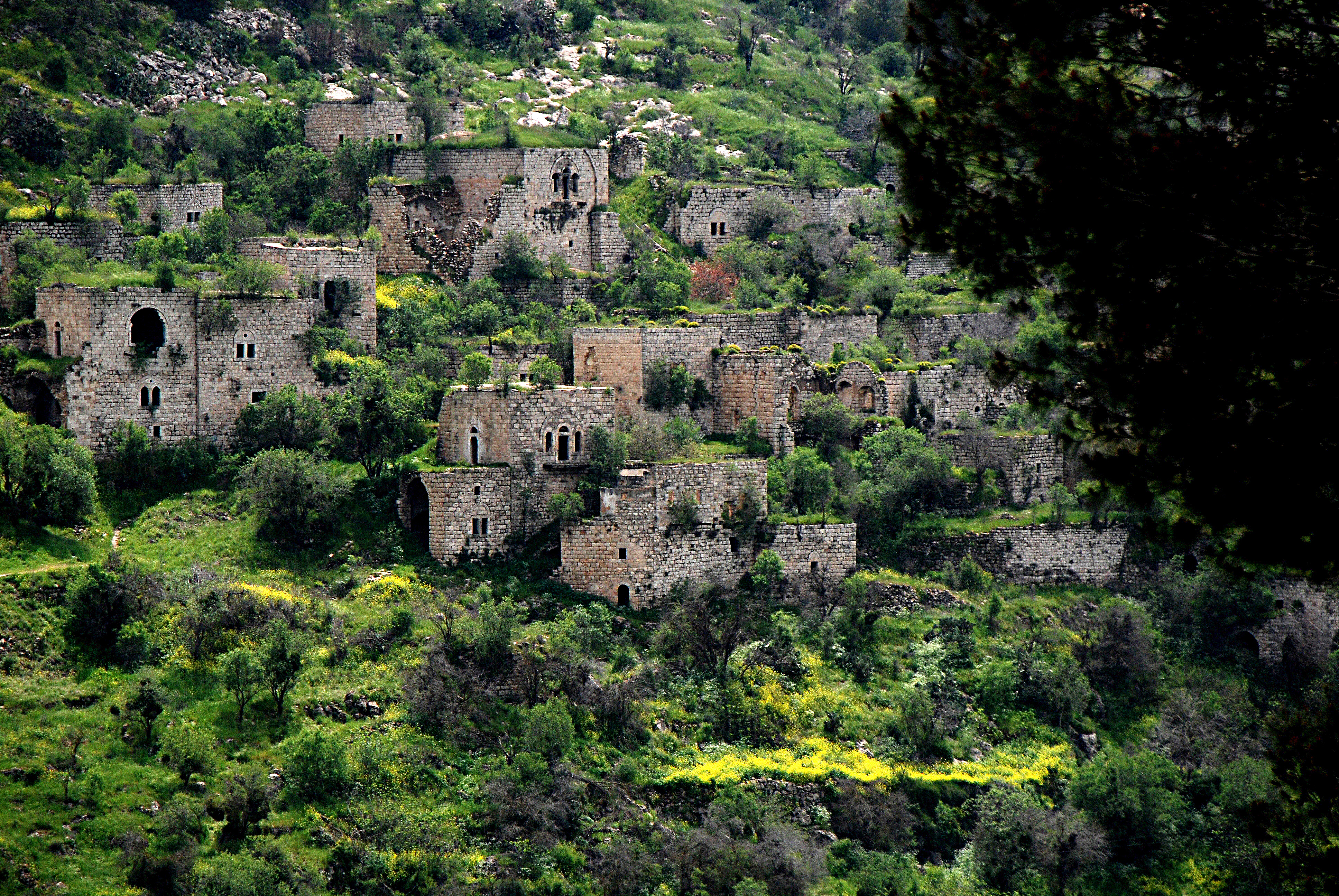 שרידי יישוב ליד מעיין. על-פני השטח נראים שרידי כפר ערבי שננטש בשנת 1948.